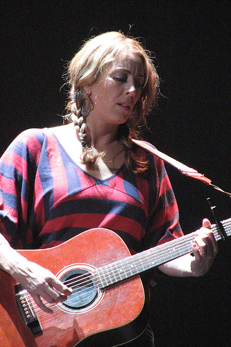 Donna